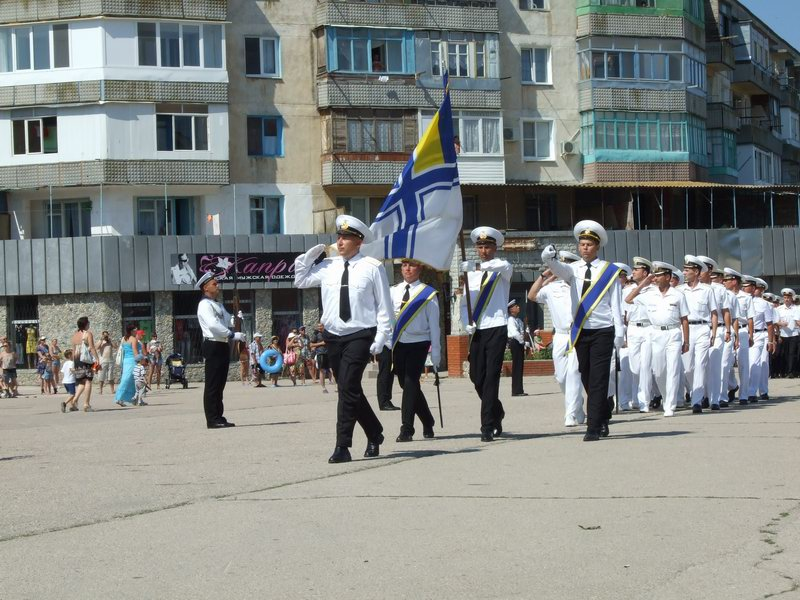 Празднование 15-летия создания Южной военно-морской базы Украины. Моряки ВМС Украины в Новоозёрном (09.07.2011)